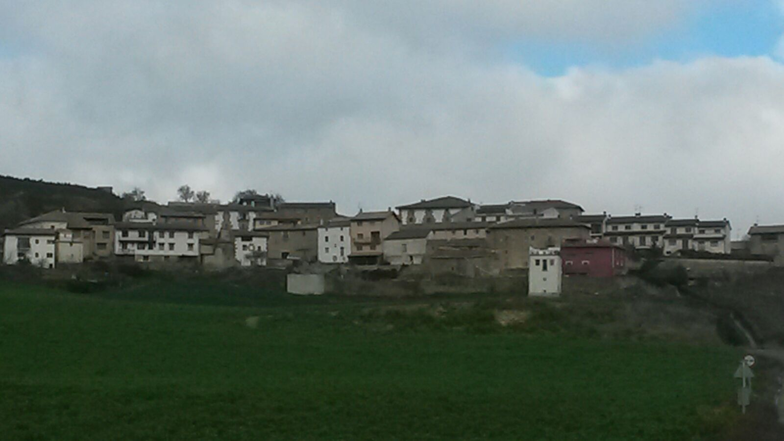 Artazu, Navarra